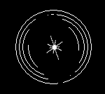 Einfache Illustration einer Dyson-Blase